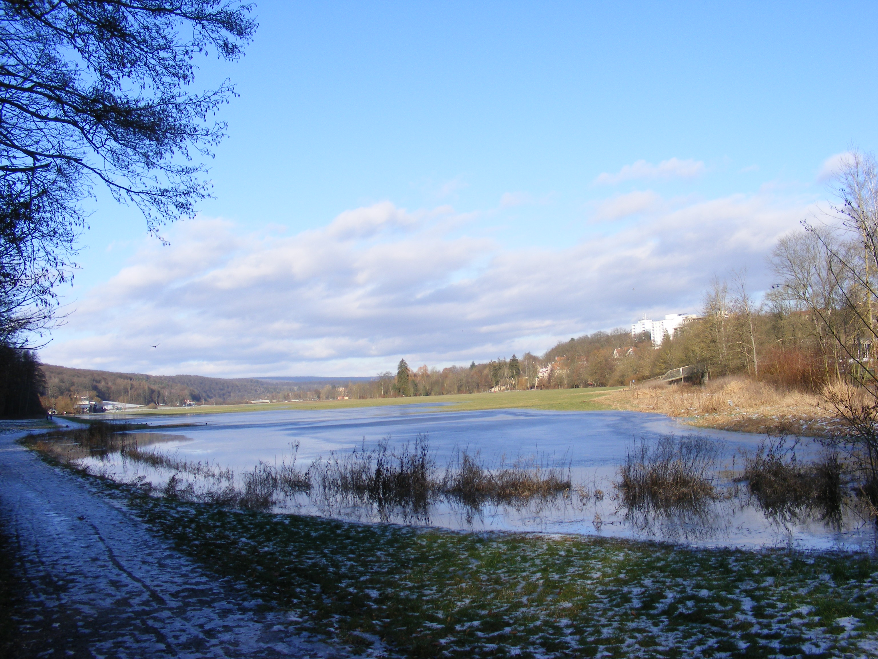 Bad Kissingen - Blick auf Flugplatz (Gebäude links); Schneeschmelze auf den Wiesen.